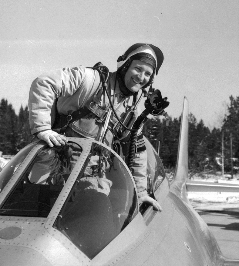 Kapten Hans Neij, F 11, rekordhållare på 1,000 km sluten bana med ev medelfart av 900.65 km/h. Rekordet sattes 23/2-55 i en S 29c. Gratisbild från Flygvapnet.